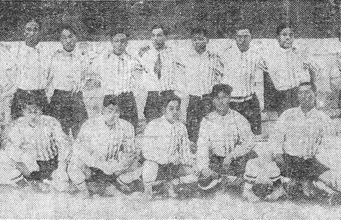 1922년 전국체육대회 축구(제3회 전조선축구대회) 청년부에서 우승한 불교청년회 선수단의 모습.